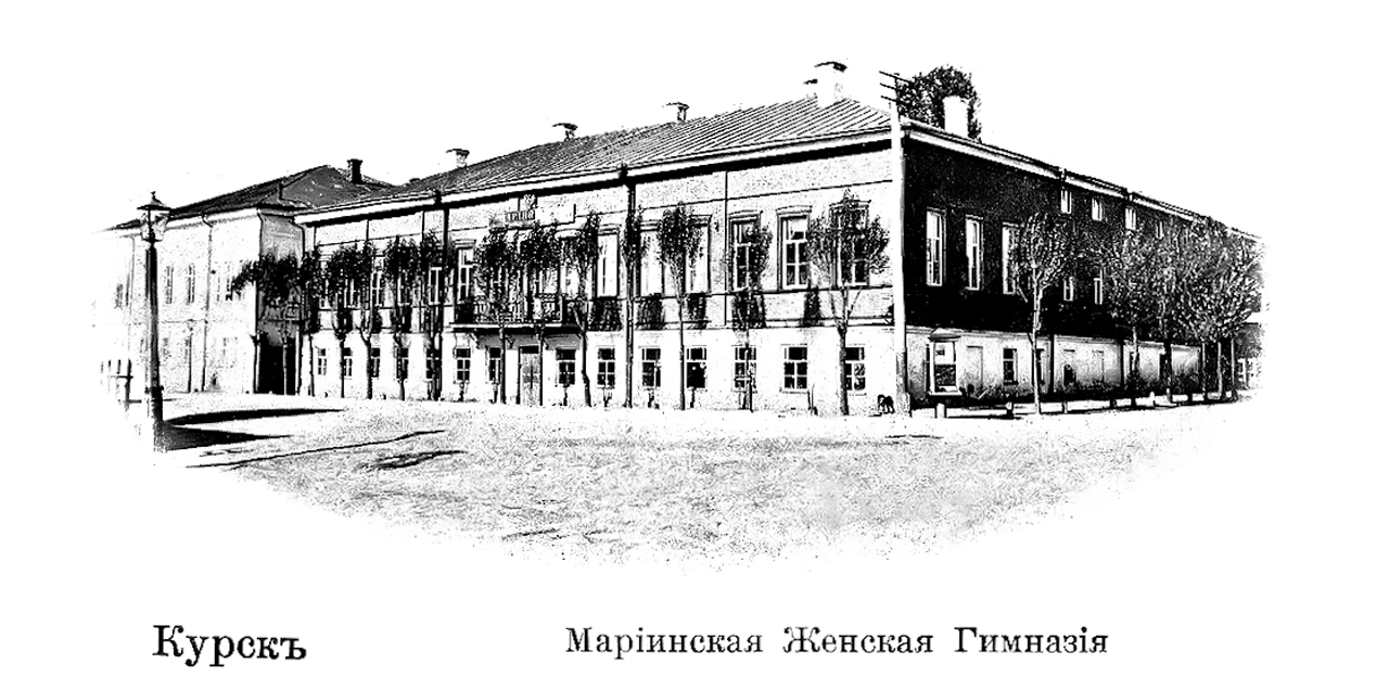 Первое здание Мариинской женской гимназии